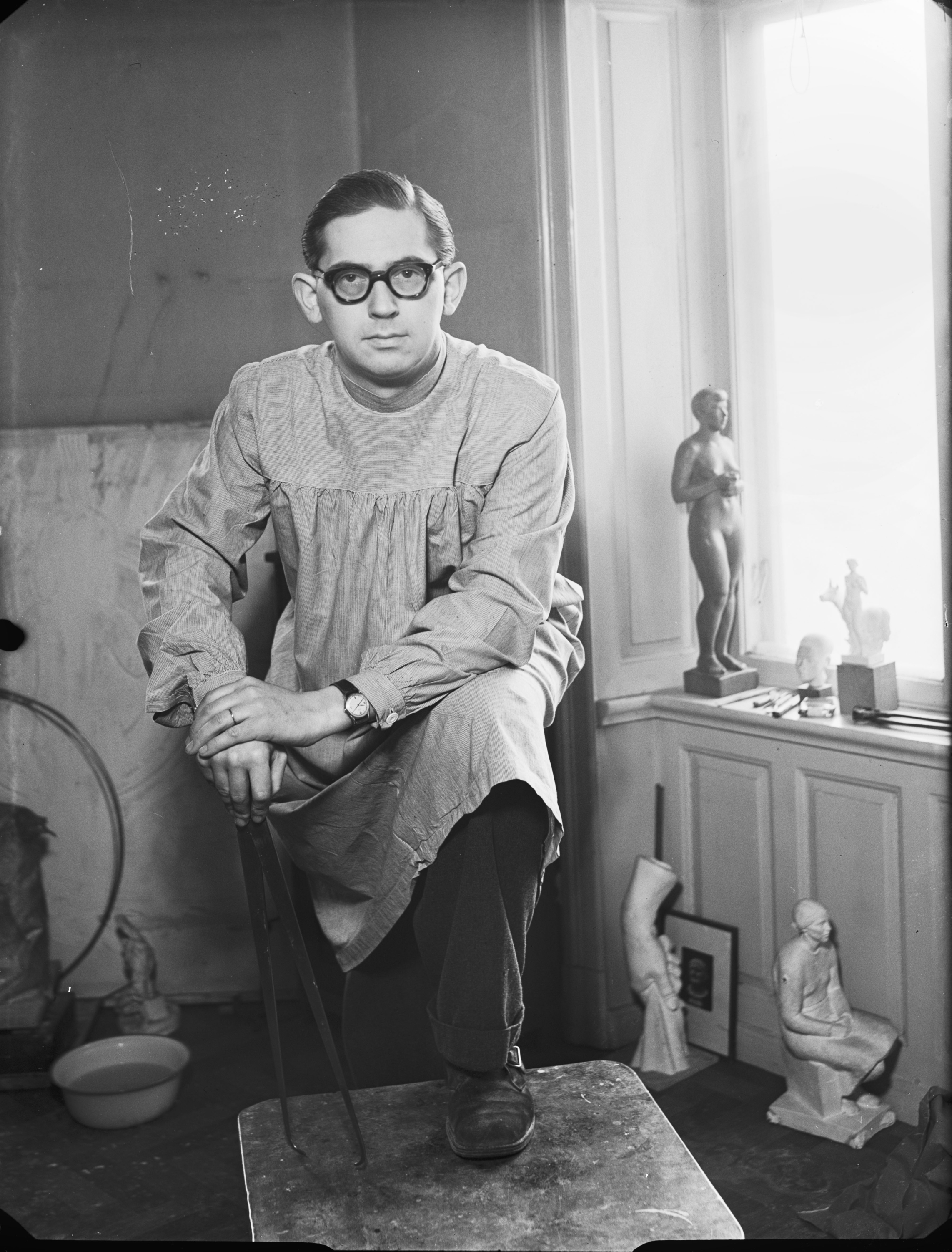 Porträtt av skulptören Bengt Lundkvist i sin ateljé. Interiör.